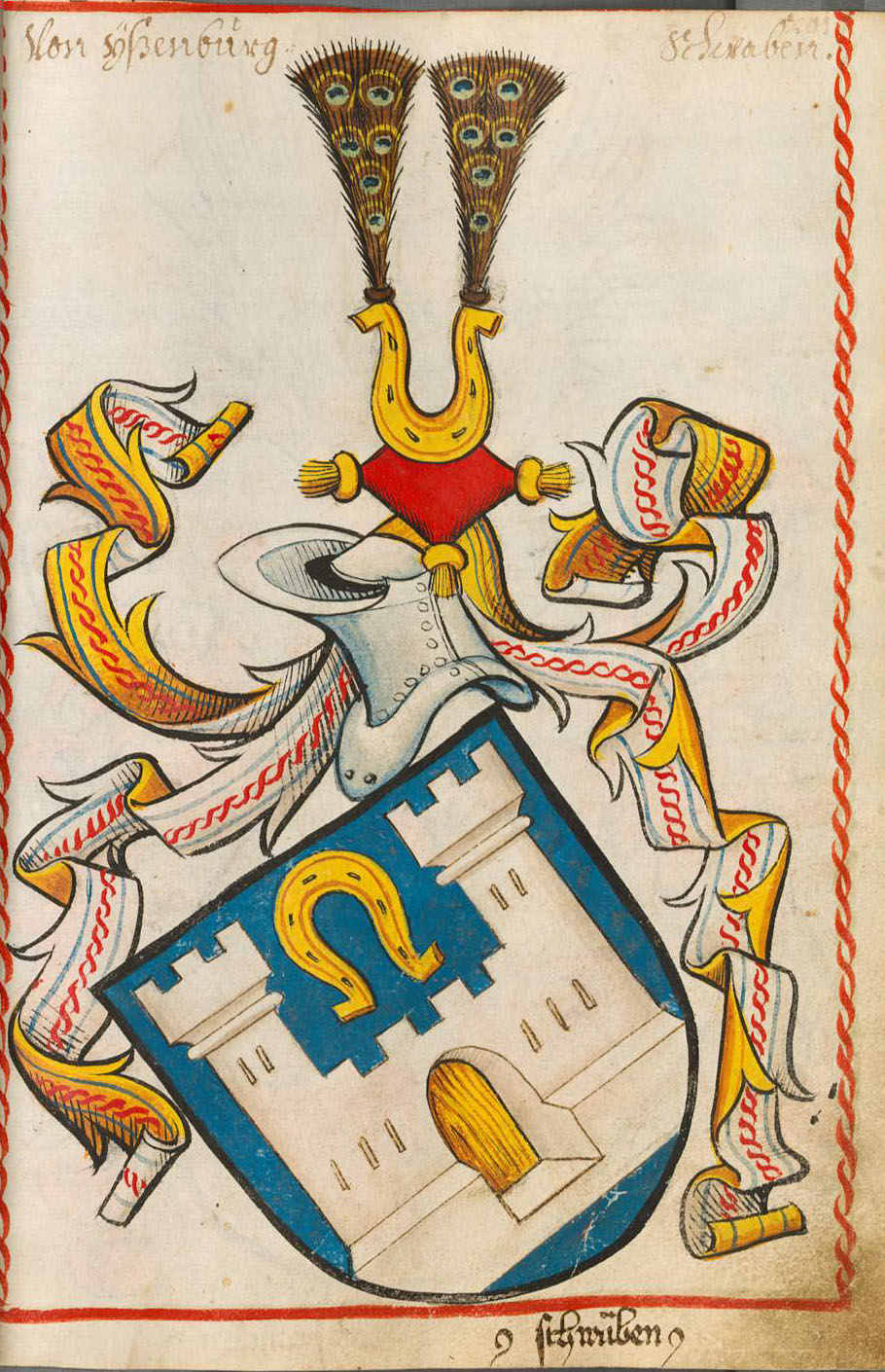 Scheibler'sches Wappenbuch, älterer Teil Eisenburg